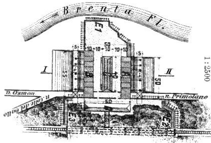 Piantina storica del forte Tombion.